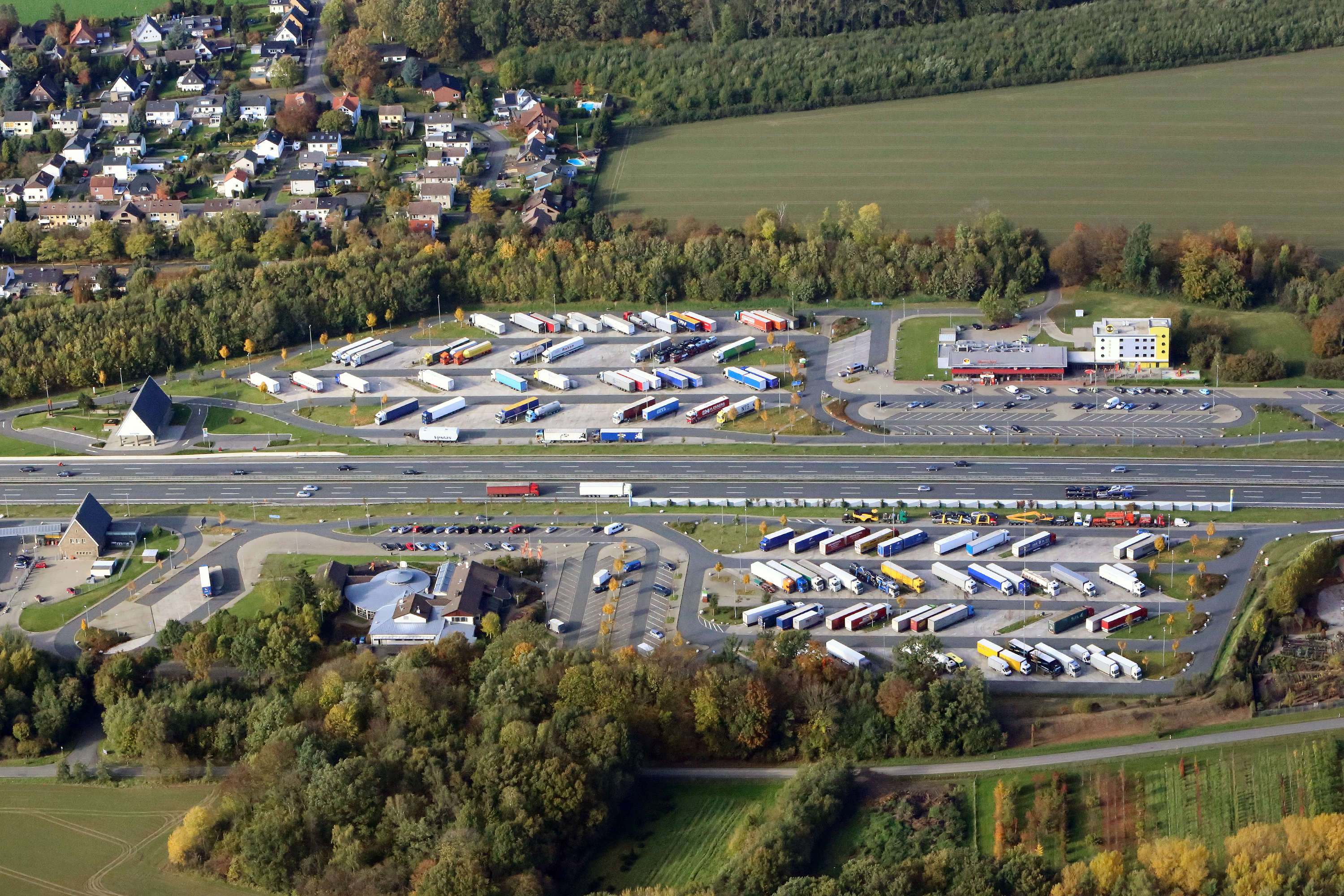 Luftbild Autobahnraststätte Hamm Rhynern A2 2013